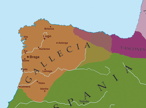 Dominios da monarquia sueva, e extensión do reino de Galicia no século V.